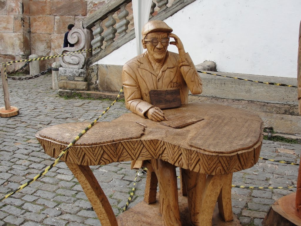 Sculpture en bois de Chico Xavier, à Ouro Preto, Brésil 2007.